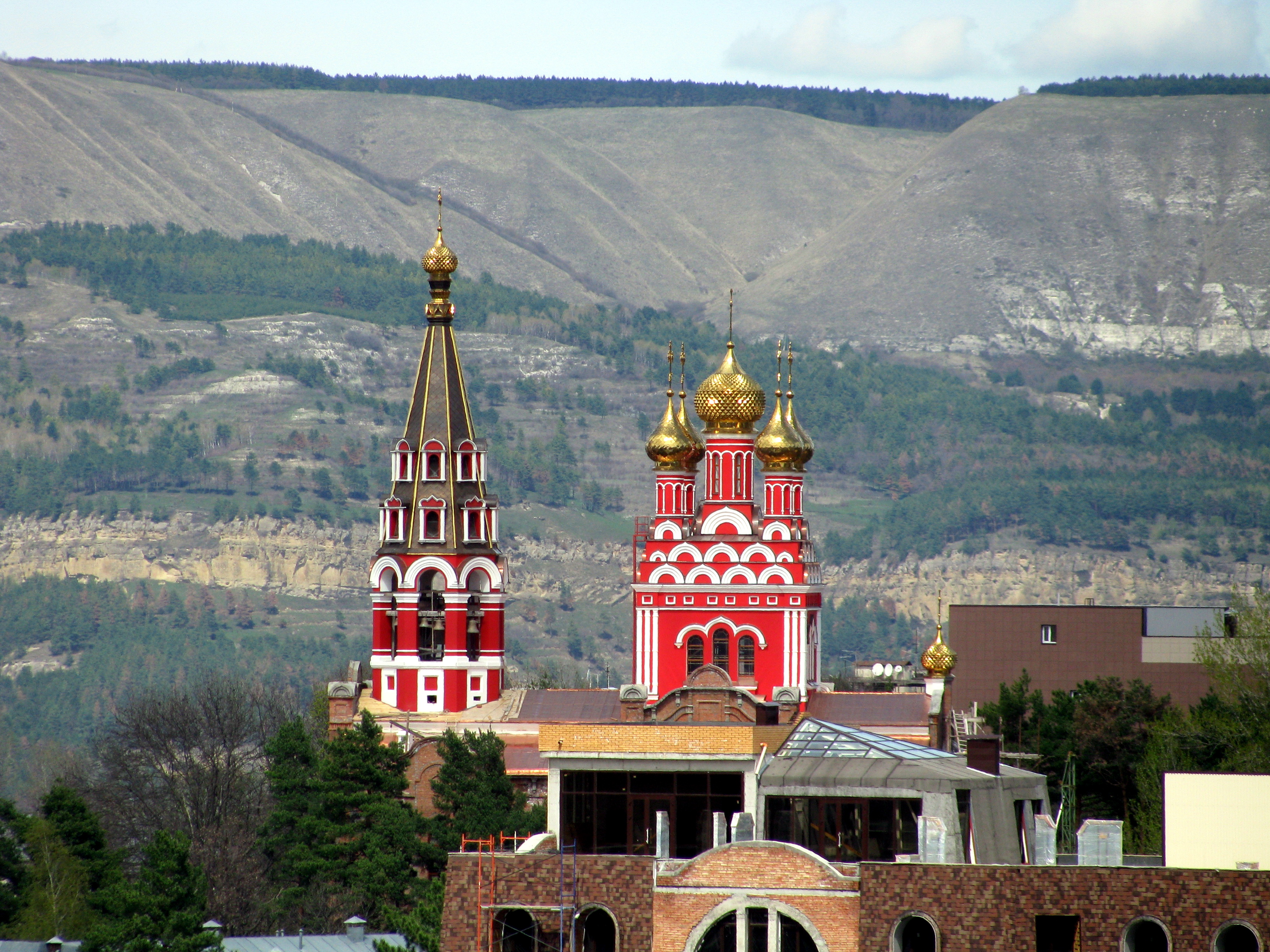 Церковь Святого Пантелеимона-целителя в Ребровой балке города Кисловодск. Вид с Каскадной лестницы.